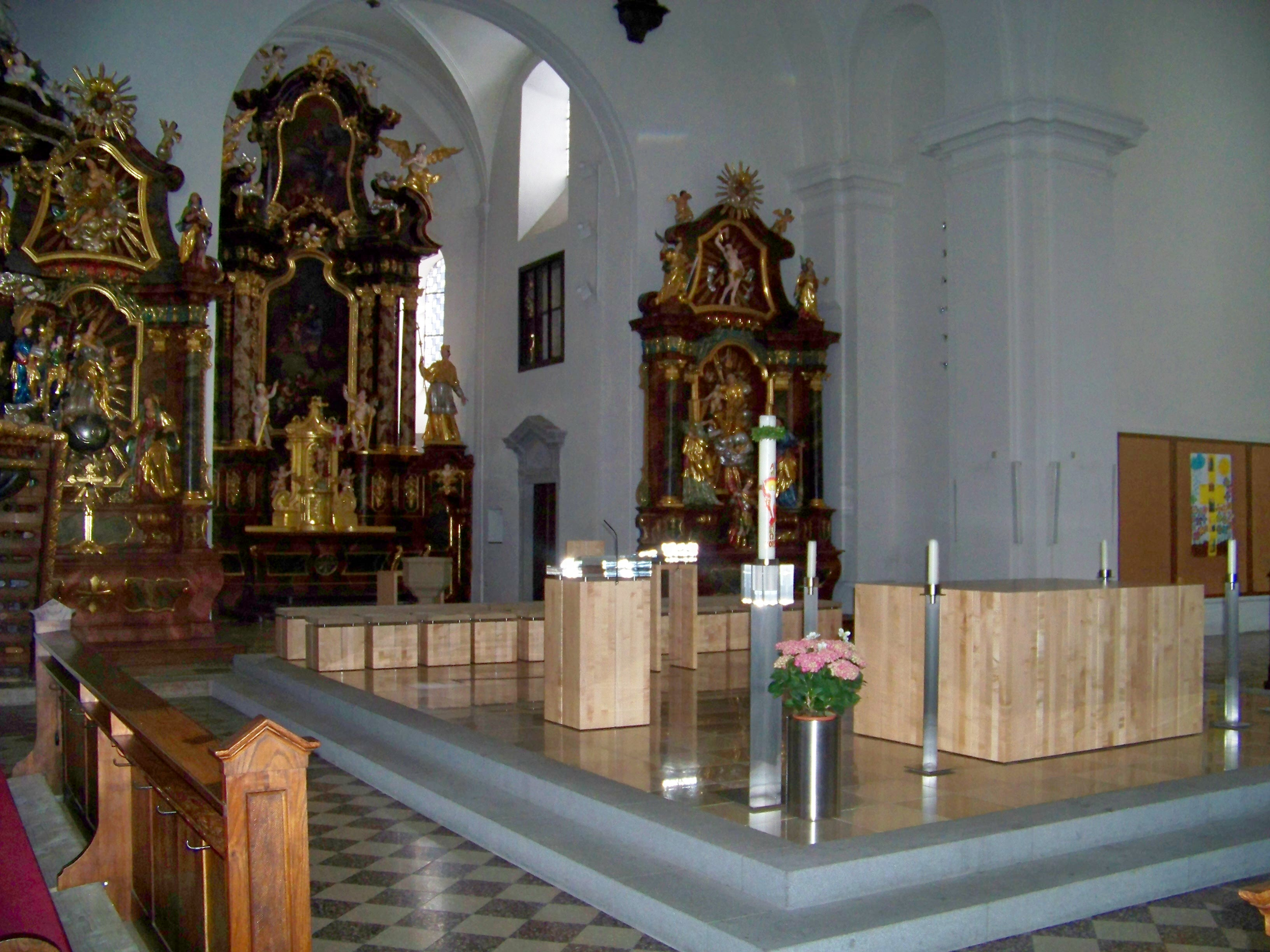 Kath. Pfarrkirche Ebensee, Altarraum